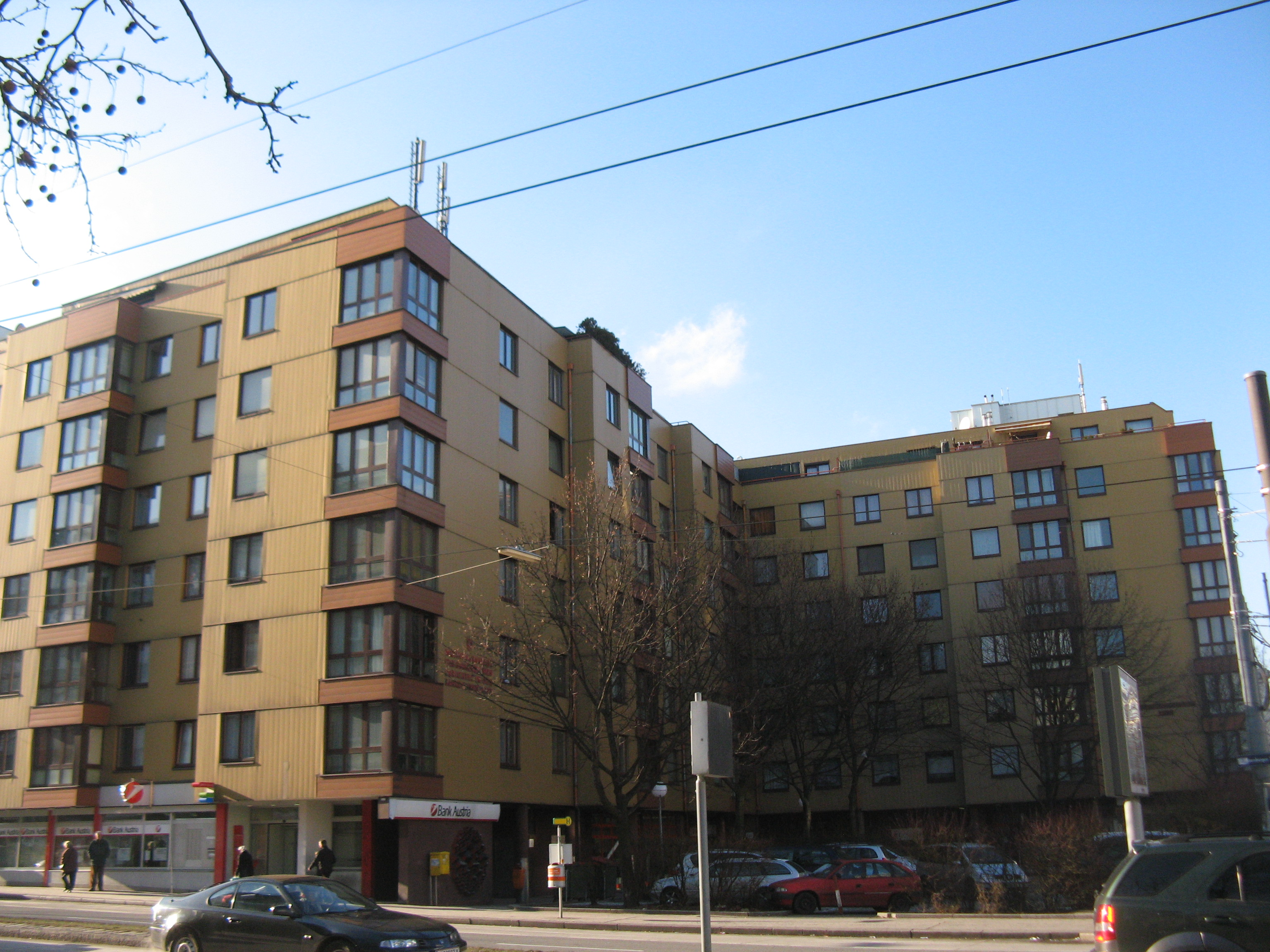 Hermine-Fiala-Hof (1980-82), Ecke Laxenburger Straße/Troststraße, Wien-Favoriten